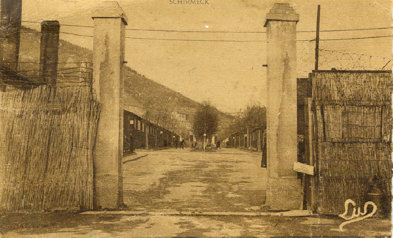 Camp de travail obligatoire de Schirmeck en 1943